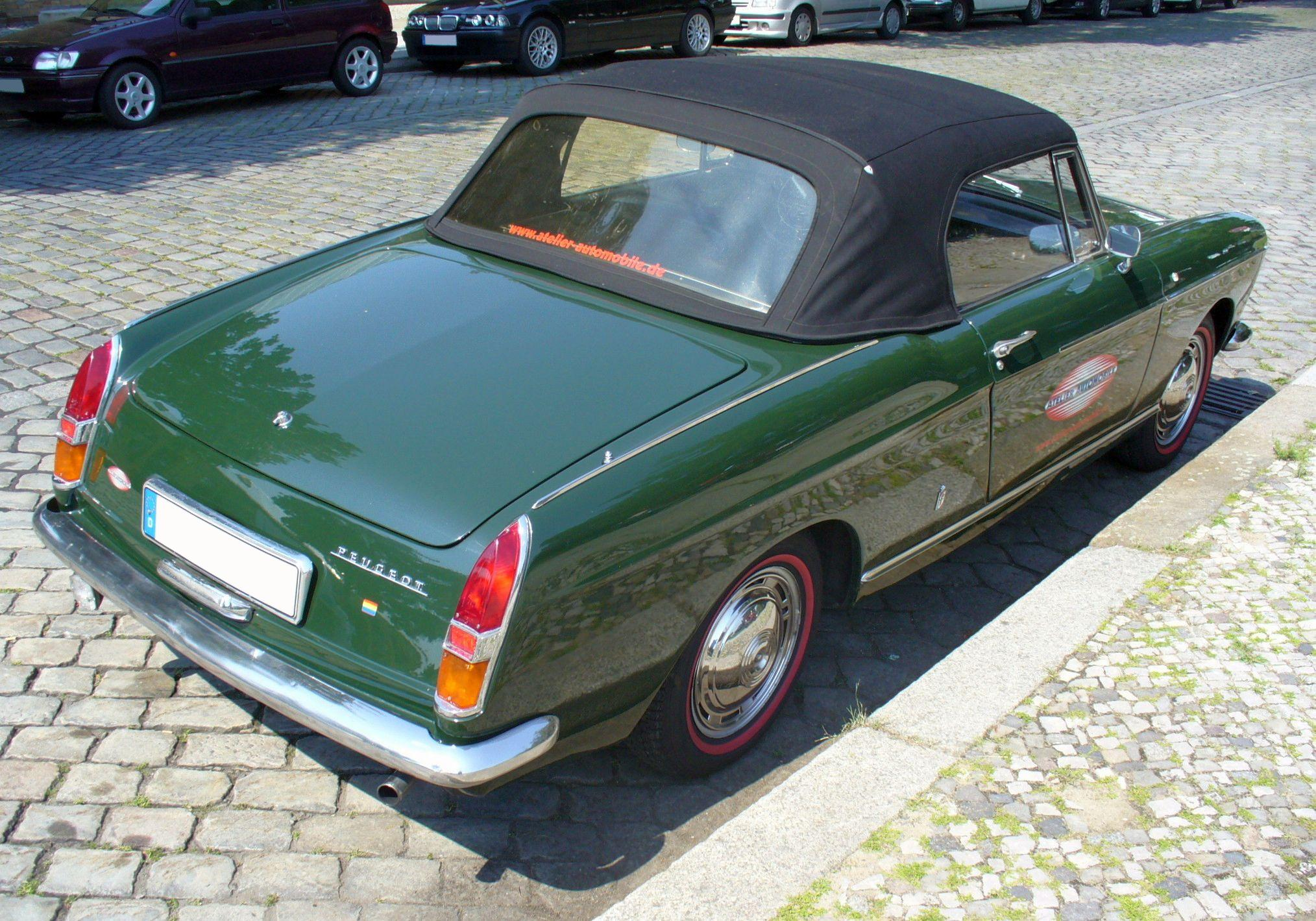 Peugeot 404 Cabrio